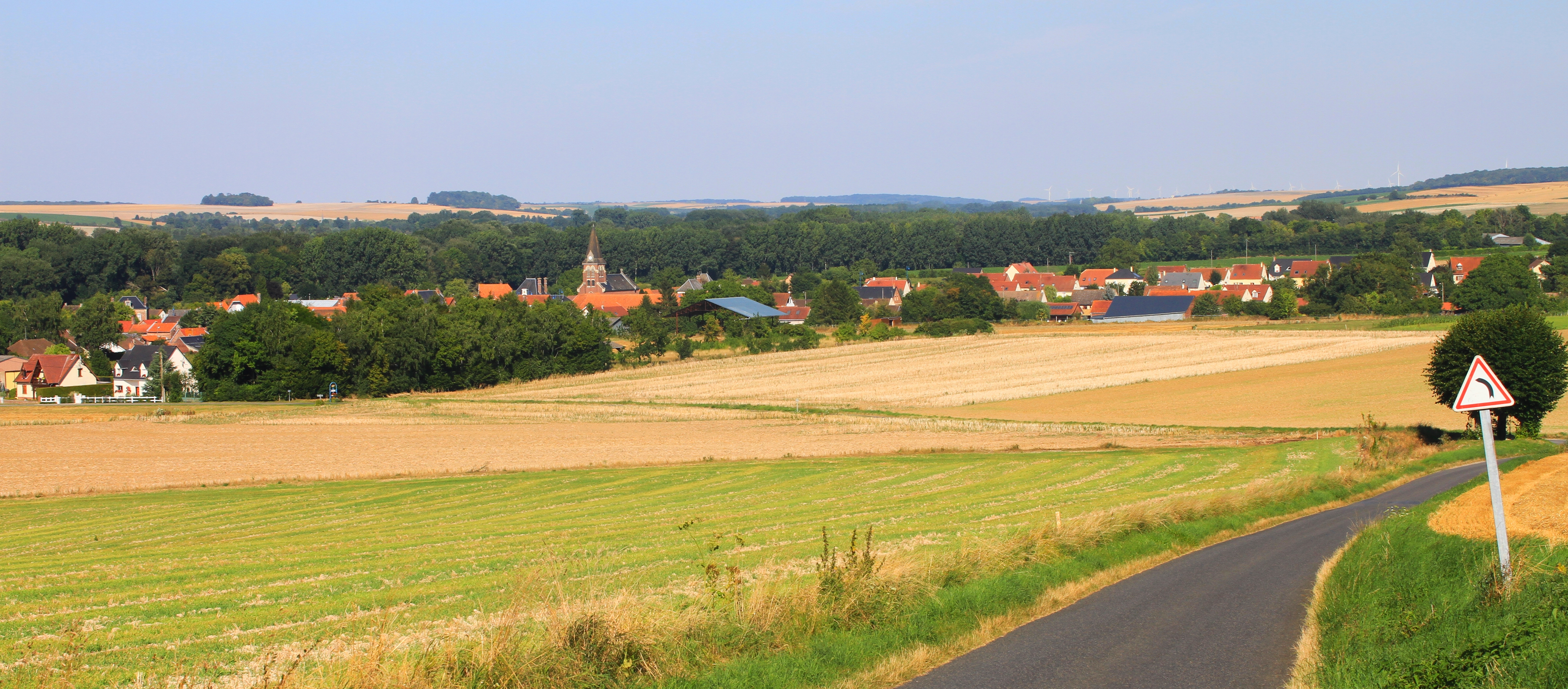 Hailles - Depuis la route de Dommartin